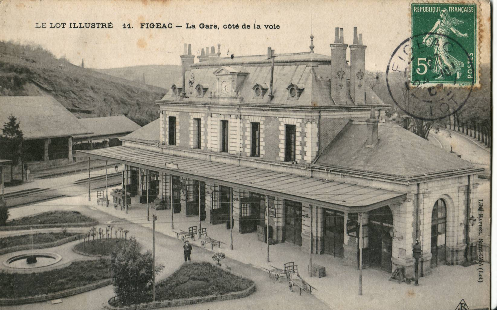 Caret postale ancienne éditée par Librairie Baudel à Saint-Céré, collection Le Lot illustré, n°11 :FIGEAC - La Gare, côté de la voie